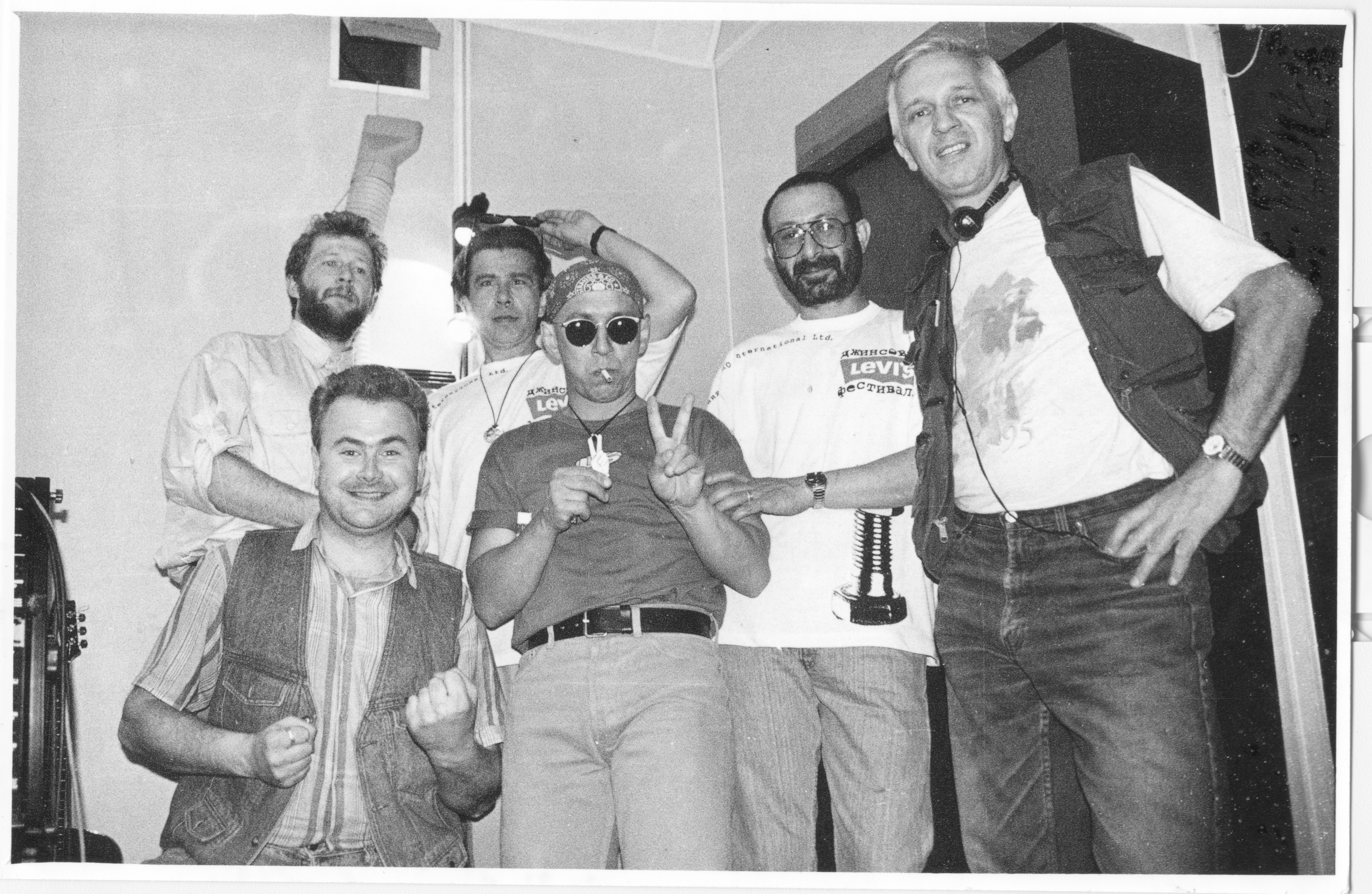 Евгений Кравцов и группа «Воскресение» на студии «Меццо-форте». Слева направо